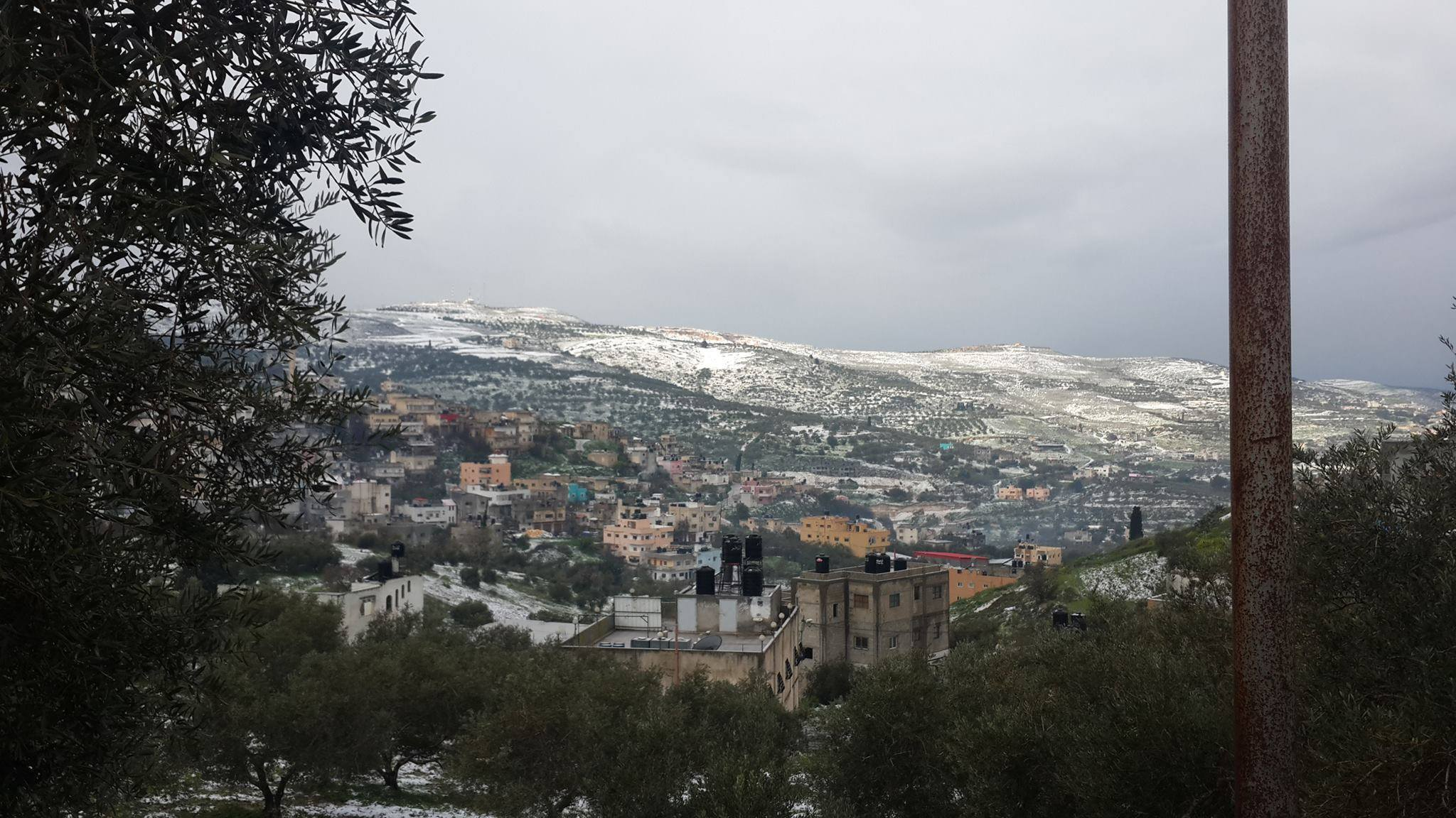 سيلة الظهر بلدة فلسطينية تقع غرب جنين في فصل الشتاء